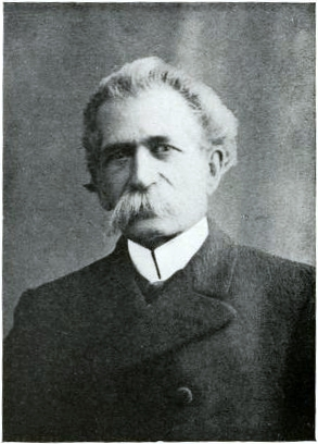 Alfredo Vásquez Acevedo